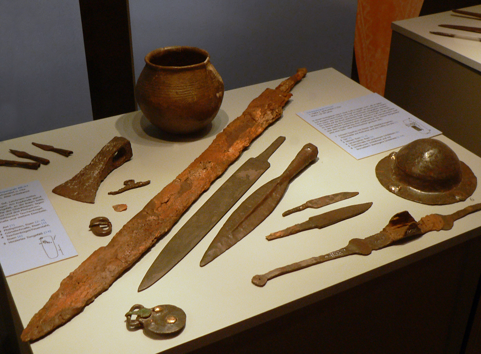 Waffen als Fundstücke vom Altsächsisches Gräberfeld Liebenau, ausgestellt im Museum Nienburg, Fotoveröffentlichung in Wikimedia Commons mit Genehmigung des Museums vom 05.11.2012